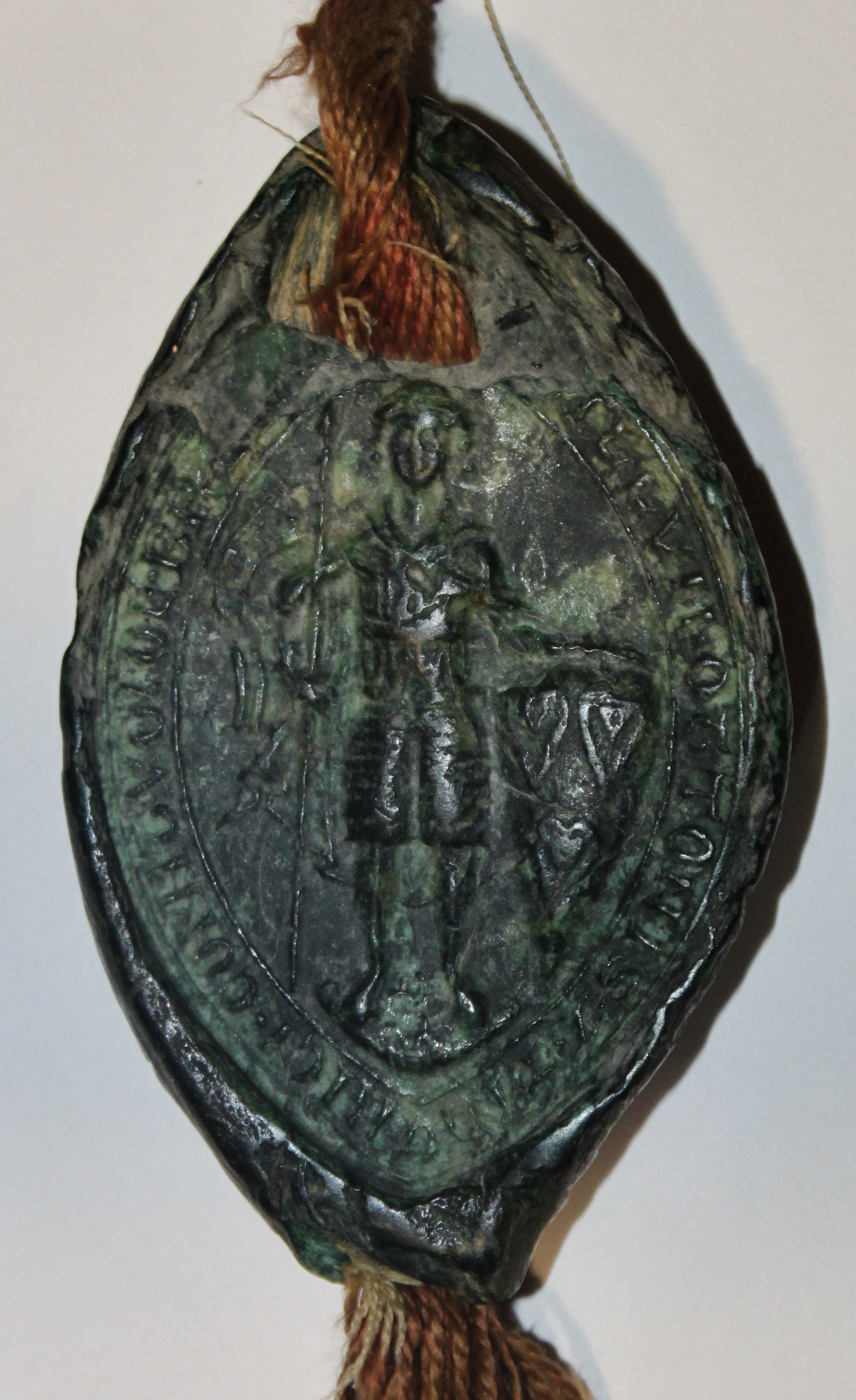 Siegel an einer Urkunde: Die Grafen von Brehna Dietrich I. und Otto II. bestätigen dem Kloser Dobrilugk eine Anzahl Güter, die es von deren Vater Friedrich II. v. Brehna, und von anderen Vorfahren oder Lehnsleuten erworben hat. Urkunde wurde 1226 in Löben ausgestellt.